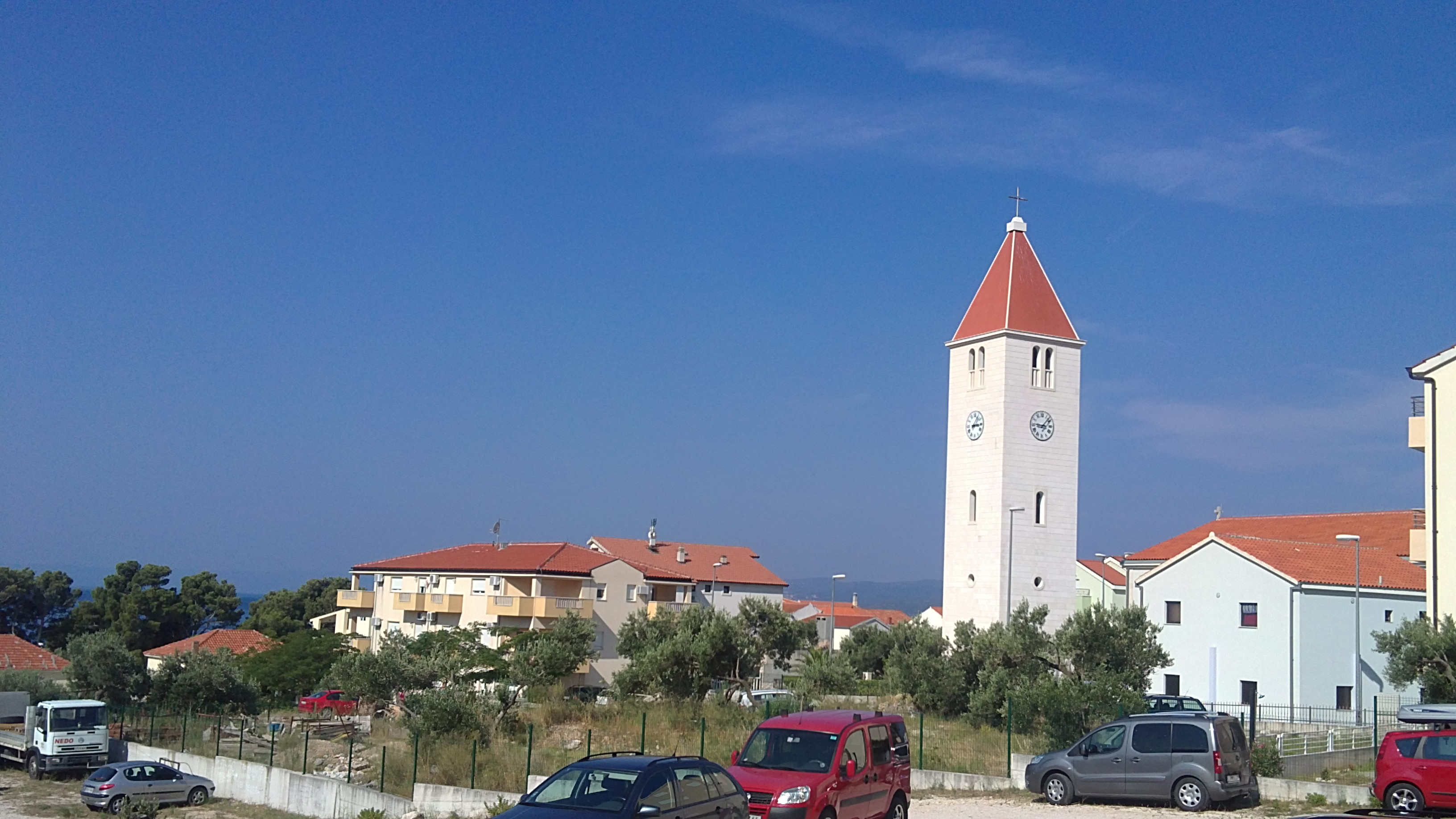 Centrum